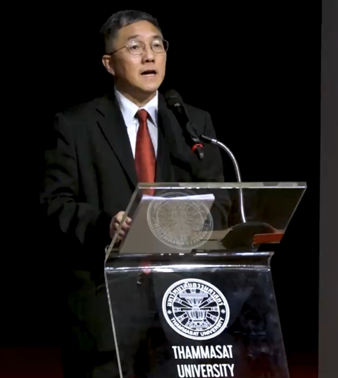 ธงชัย วินิจจะกูล